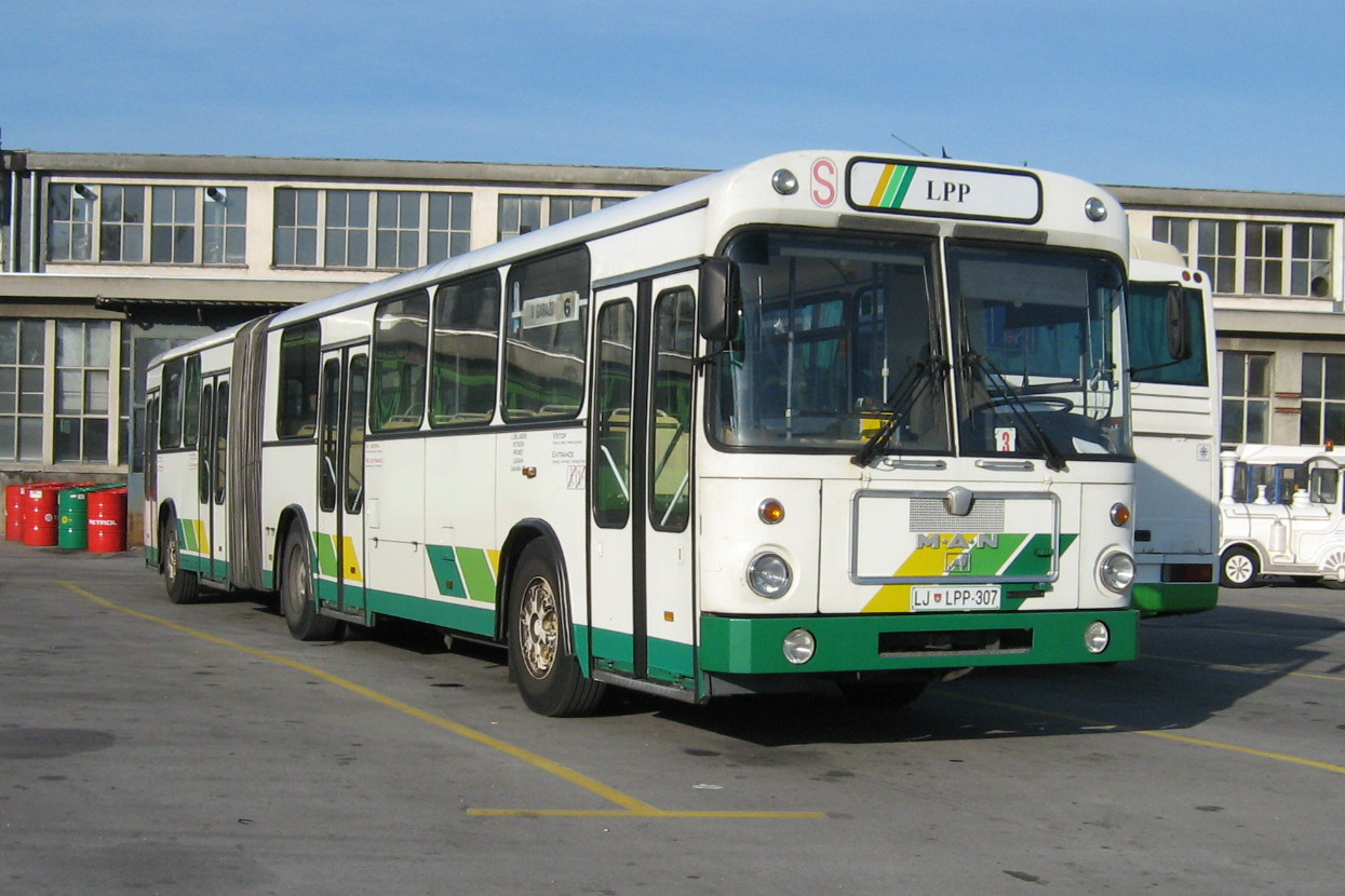 Avtobus MAN SG 220 (nadgradnja opravljena v Avtomontaži) v lasti Ljubljanskega potniškega prometa. Avtor: Uporabnik:BurekBuster